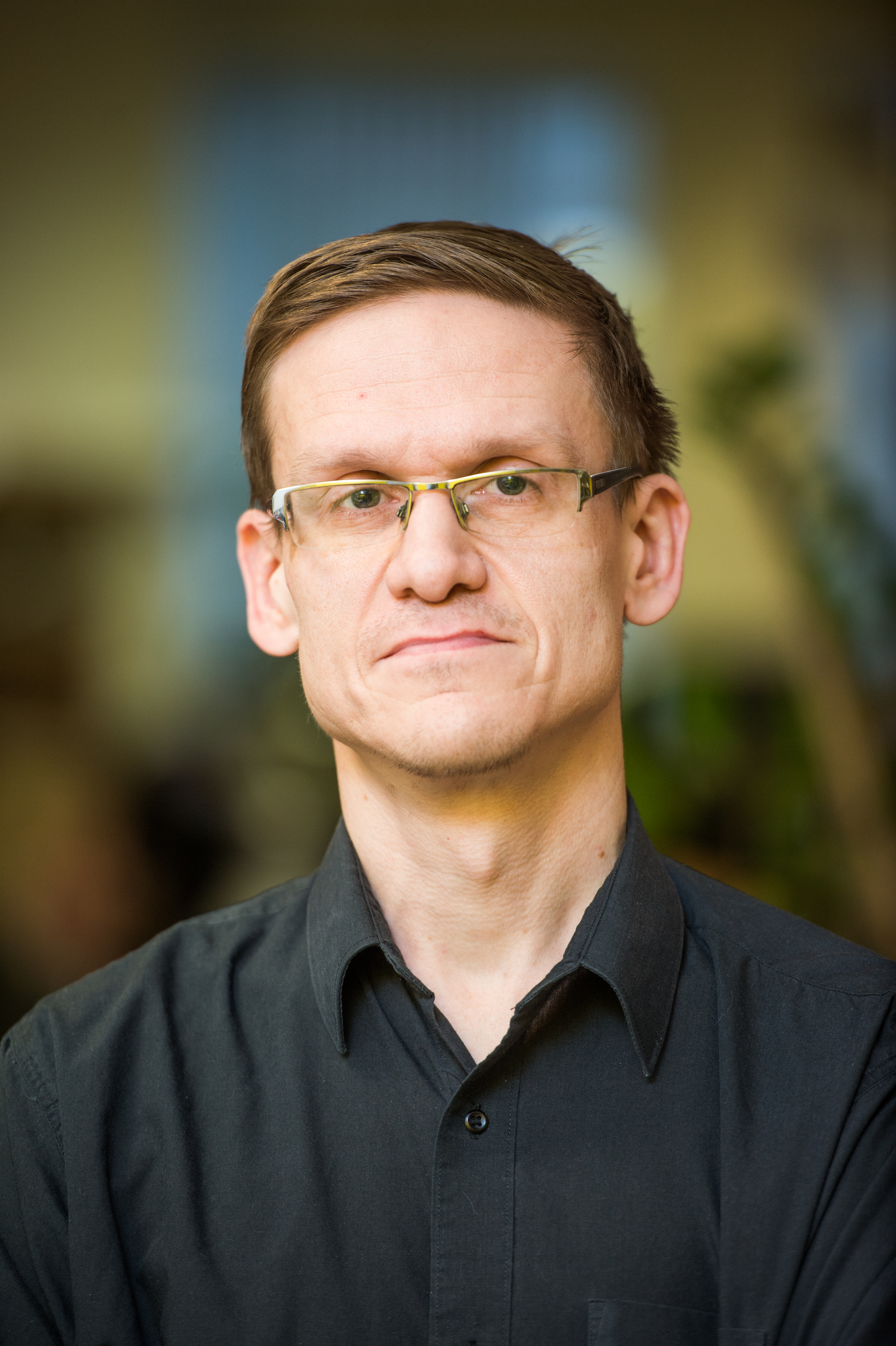 Andres Vaher